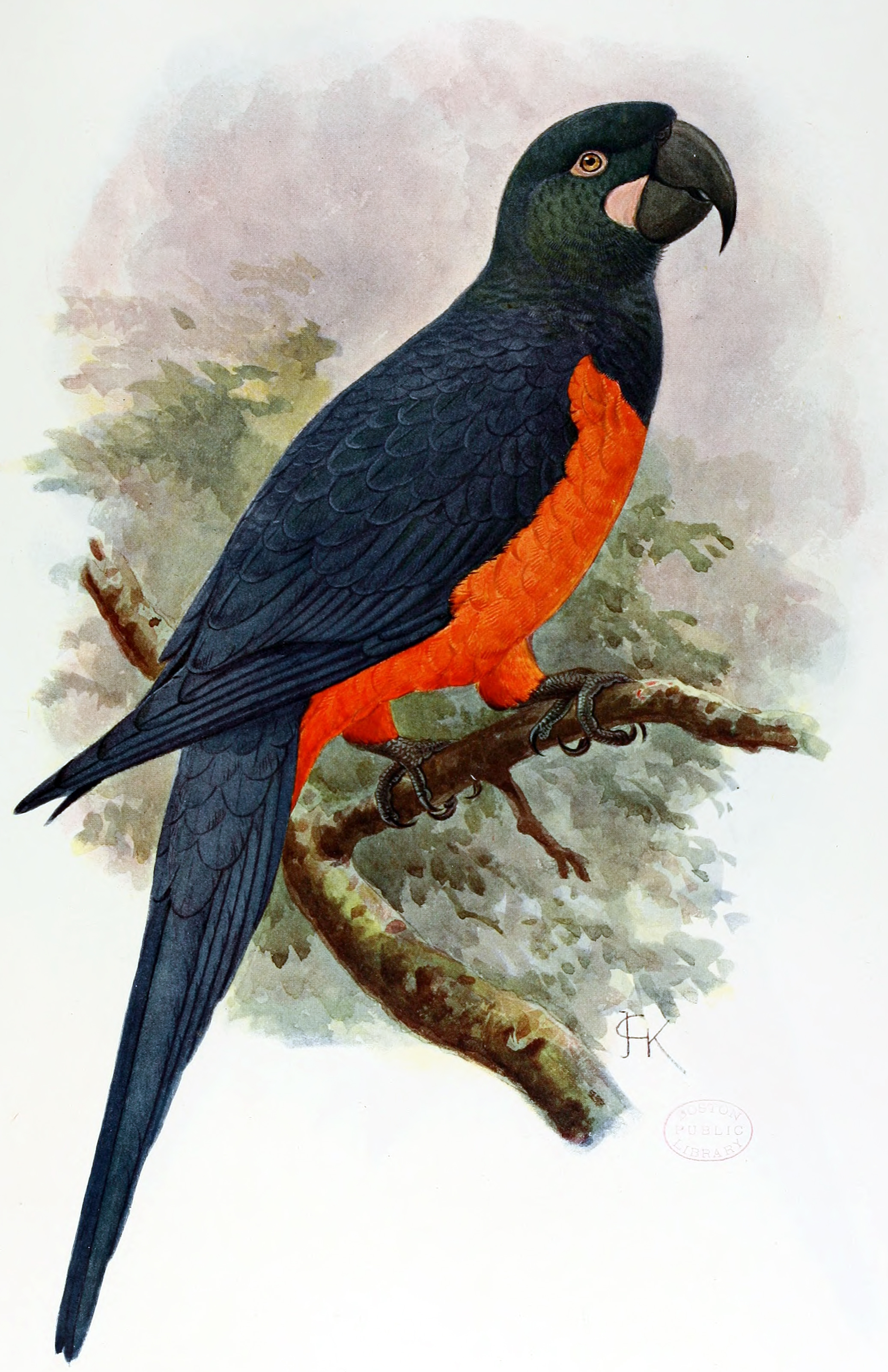 Ara martinica, Martinique-Ara